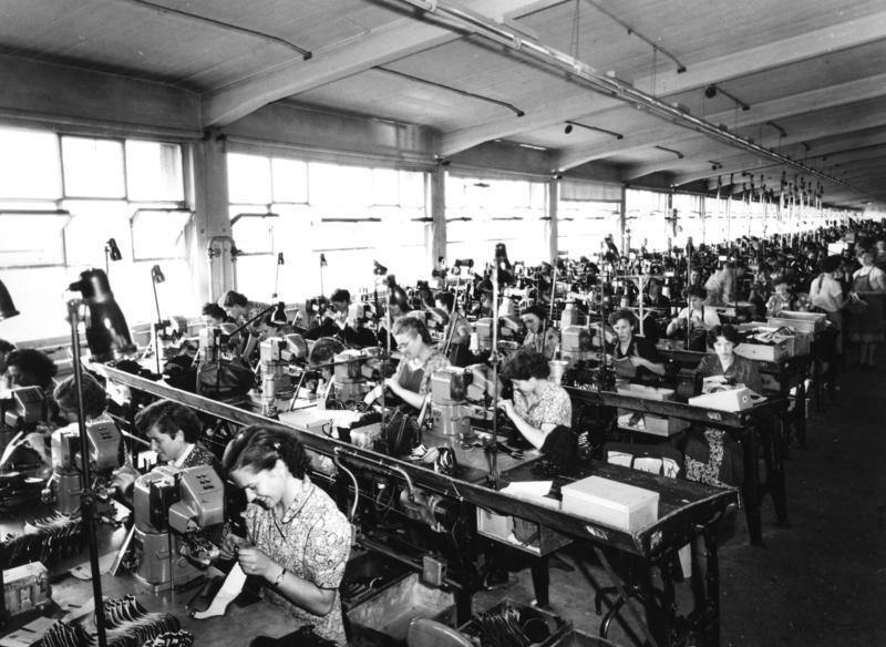 Salamander-Schuhfabrik